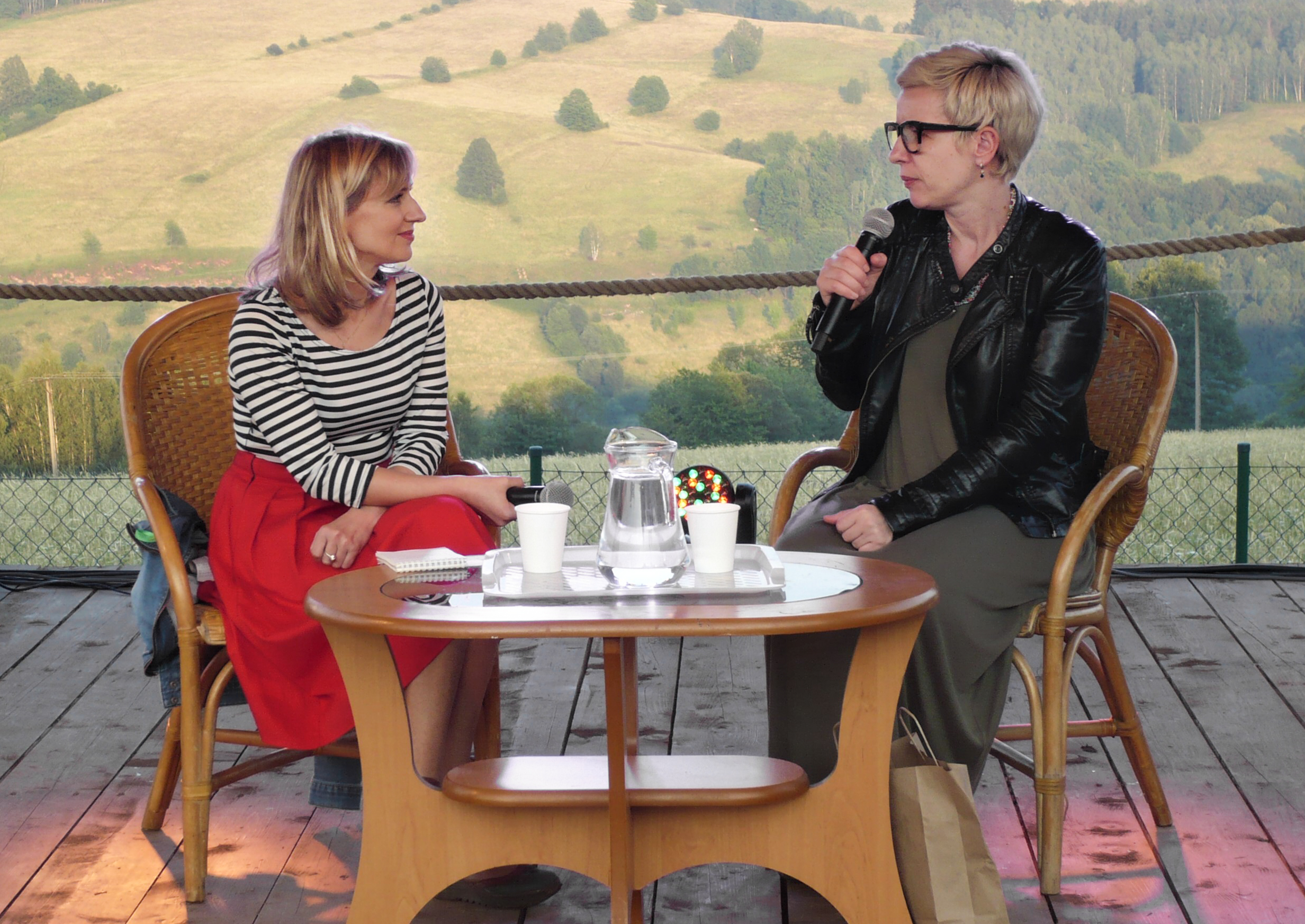 Justyna Sobolewska podczas Festiwalu Góry Literatury 2017